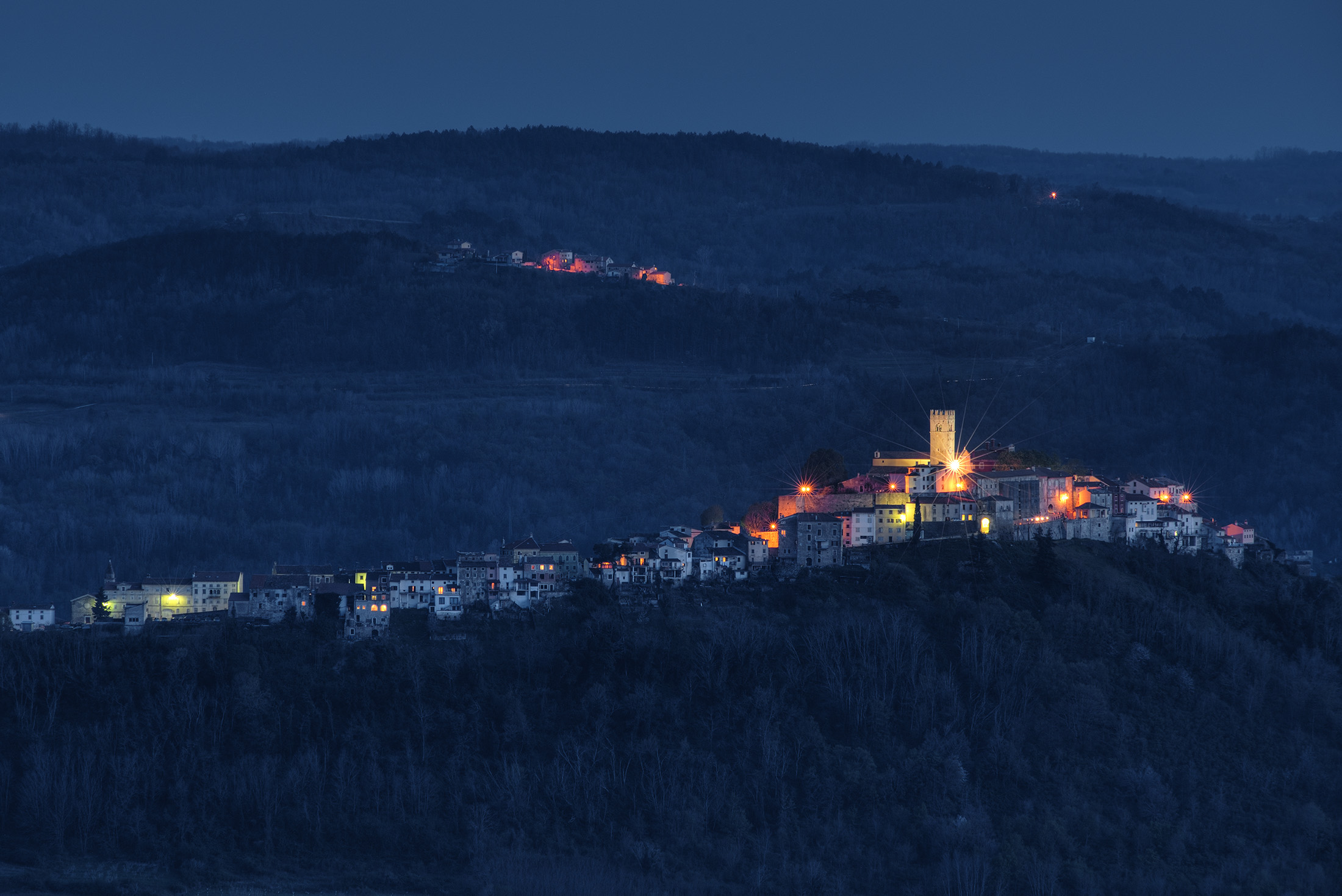 Kulturno-povijesna cjelina Motovuna, RRI-0036-1962.